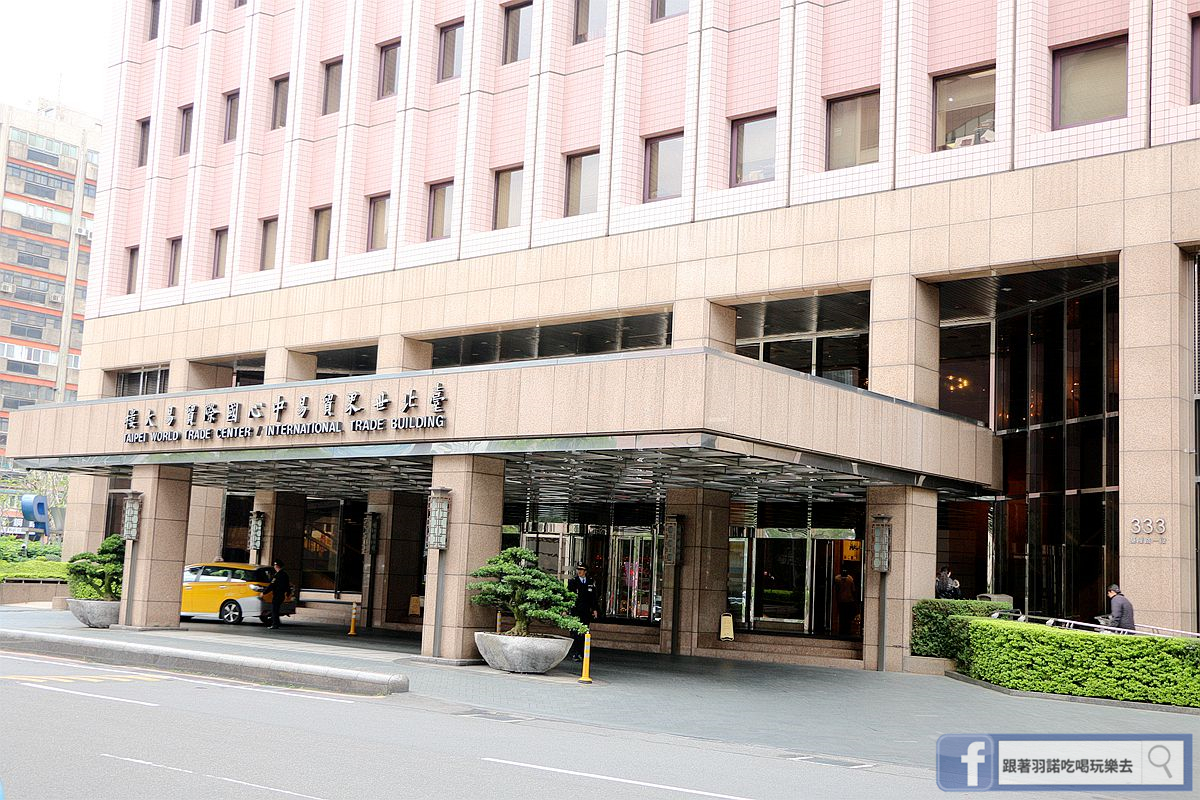 台北世界貿易中心國際貿易大樓，位於臺北市信義區基隆路一段333號。